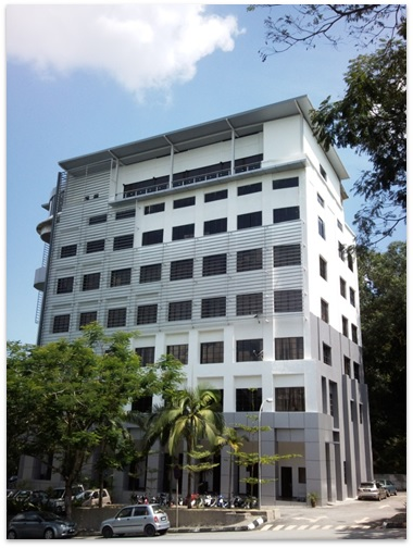 Bangunan Wisma ITBM.